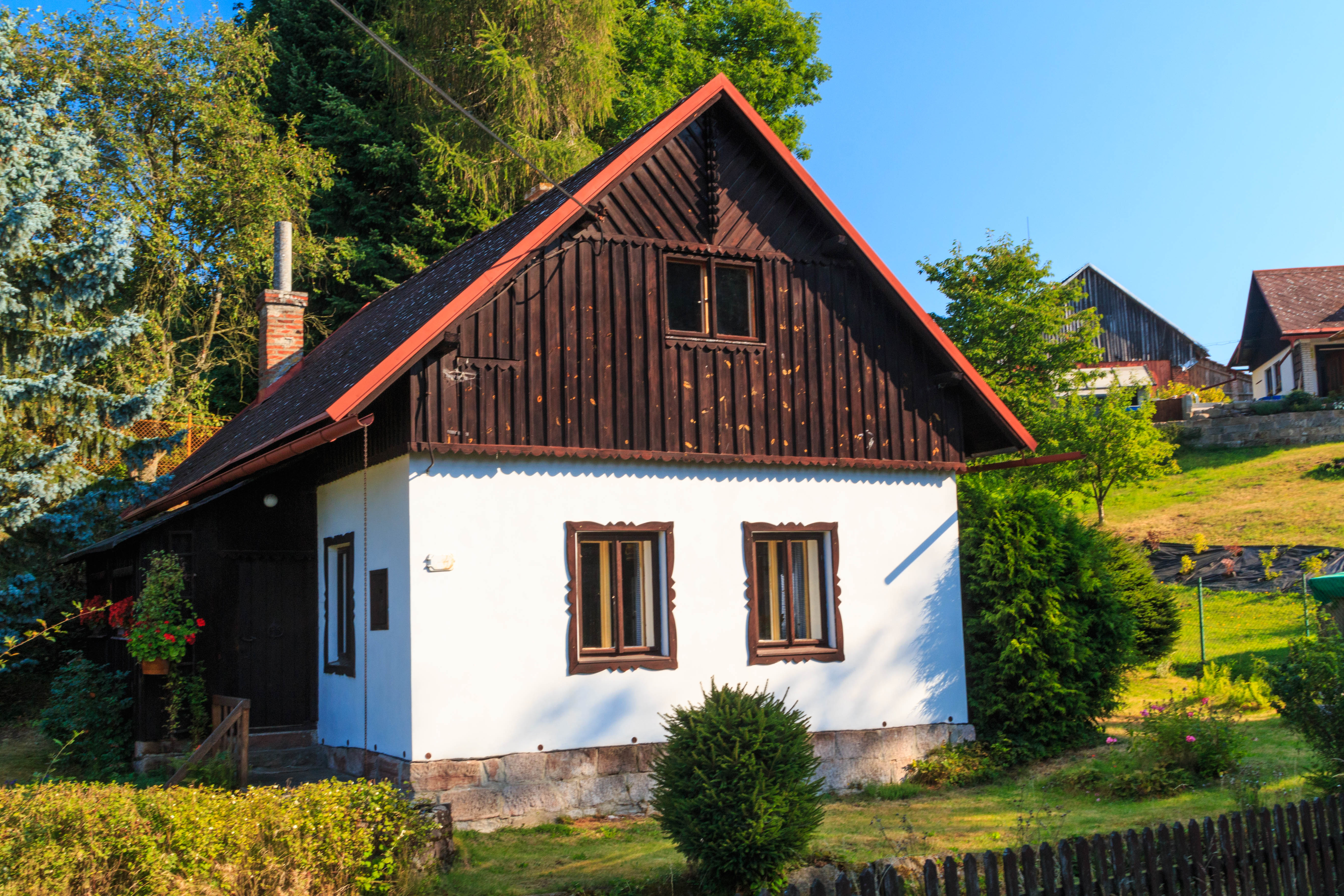 Skuhrov u Lomnice nad Popelkou - čp. 20